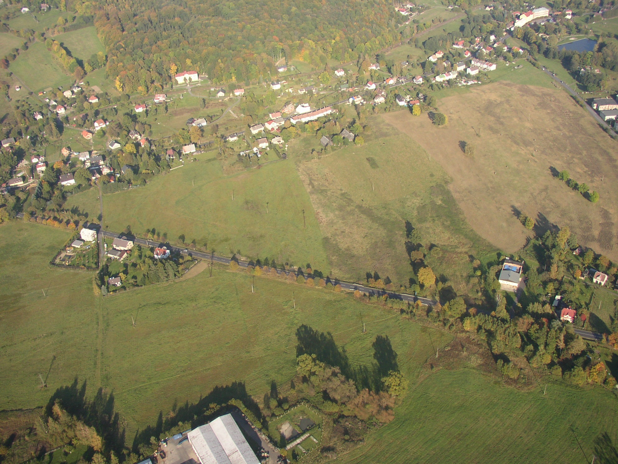 Luftbid von Teil von Dolní Podluží